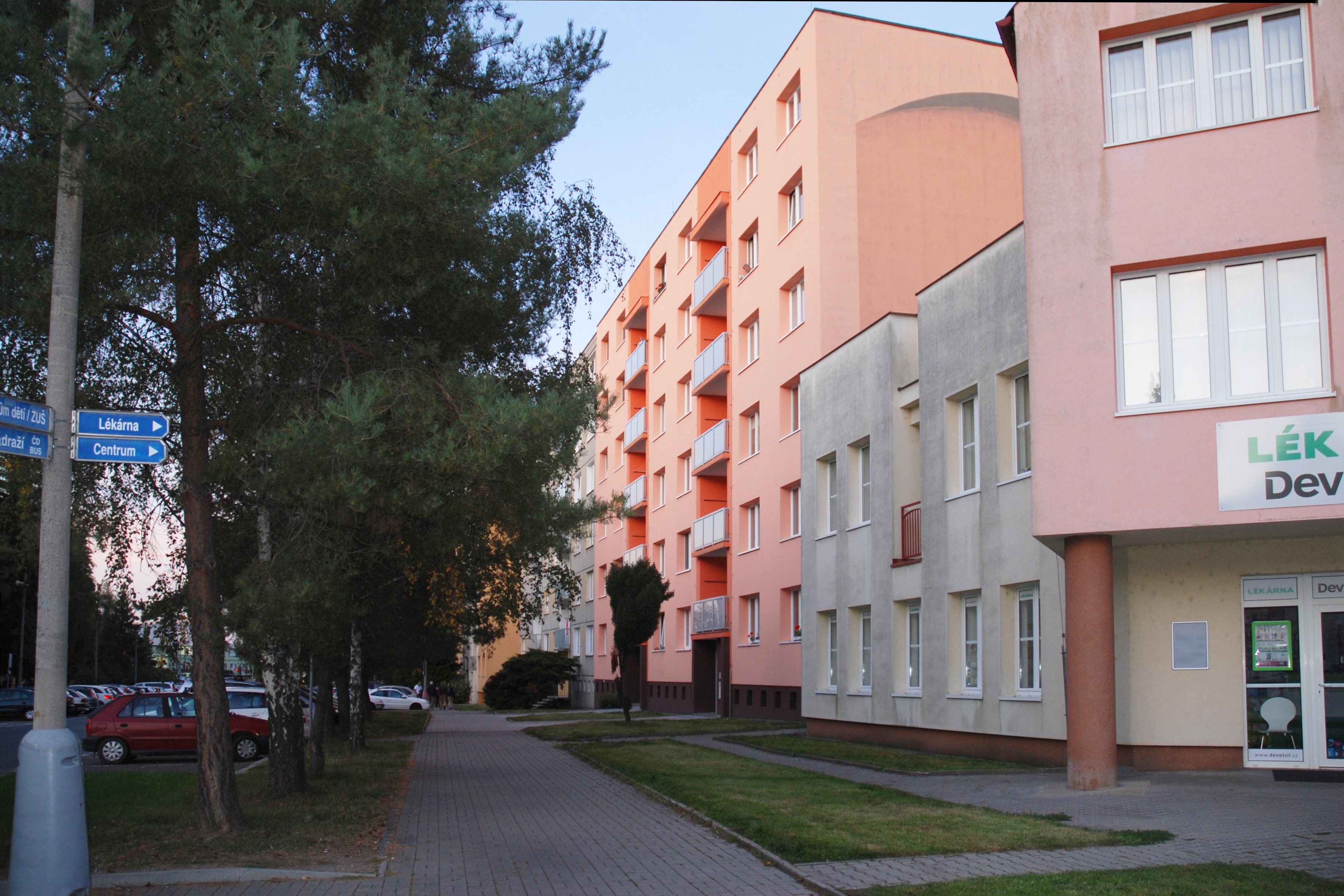 Přeštice, Husova ulice, místo zaniklé synagogy